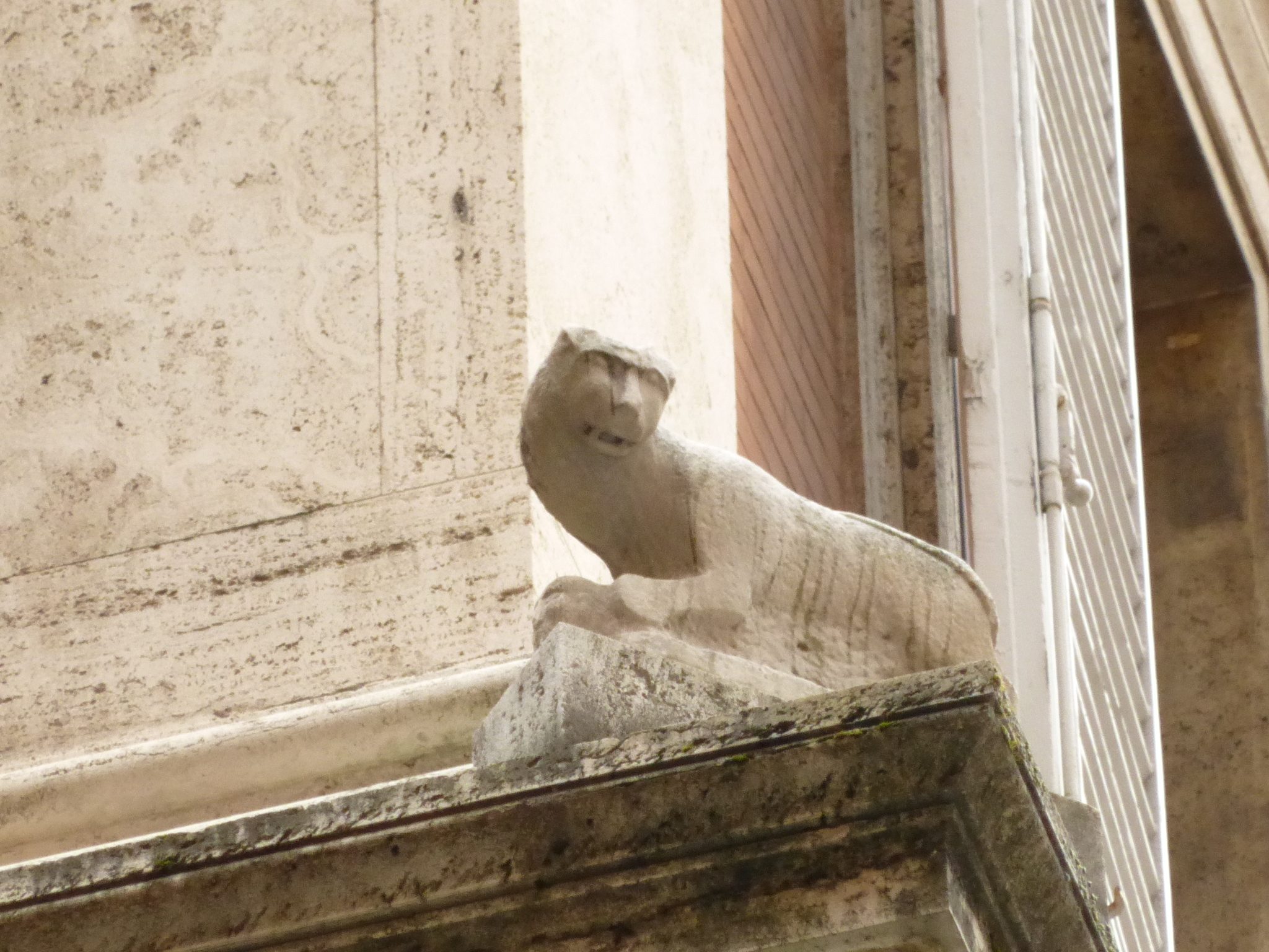 Roma, rione Pigna: la gatta di palazzo Grazioli (via della gatta)